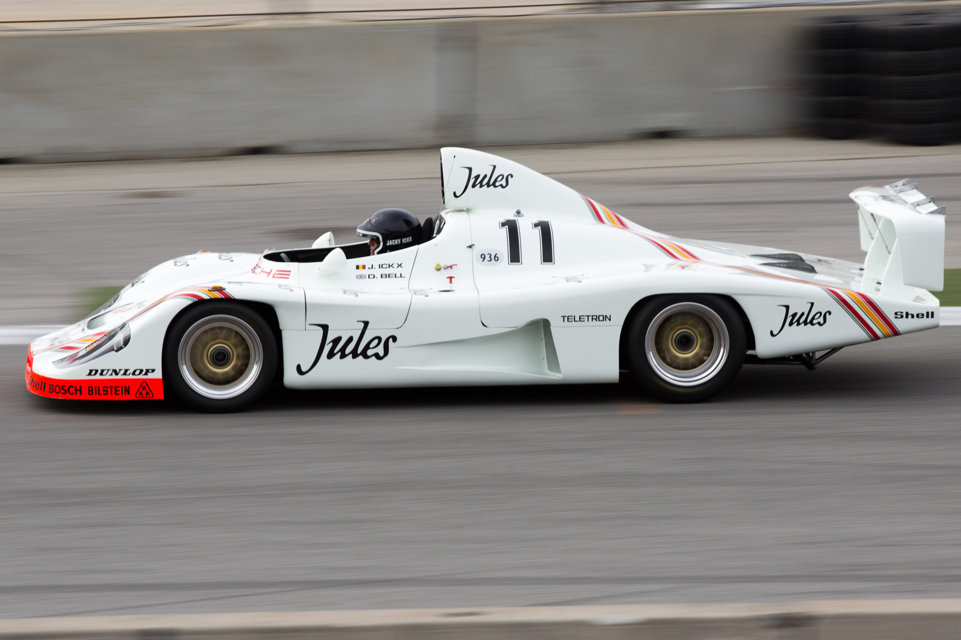 Rennsport Reunion V